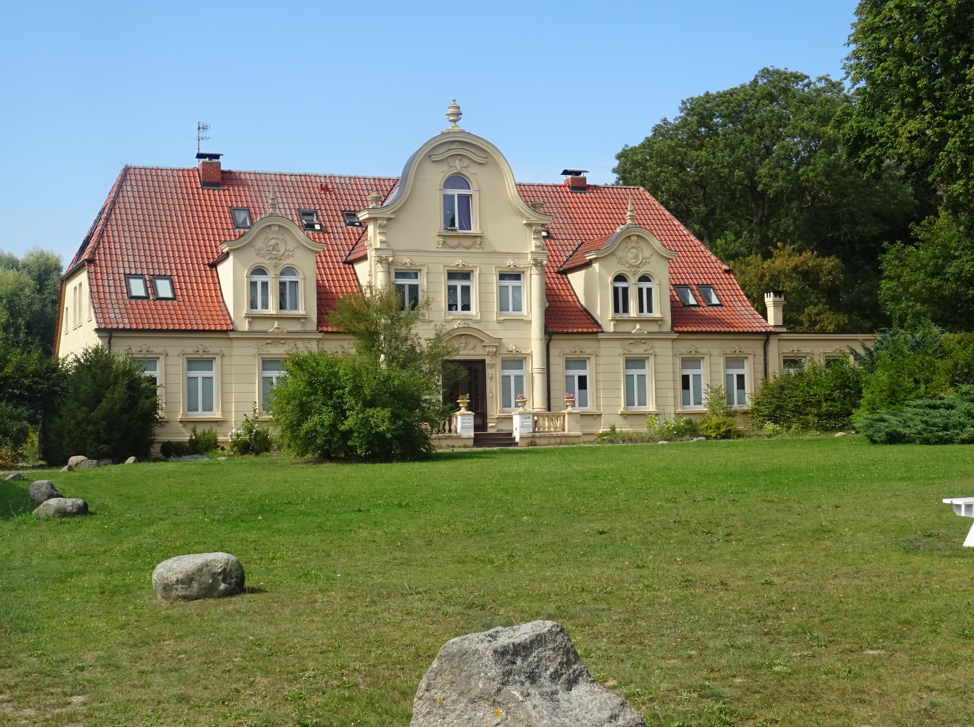 Gut Teschendorf, Gemeinde Brodersdotf, denkmalgeschützt, Gutshaus